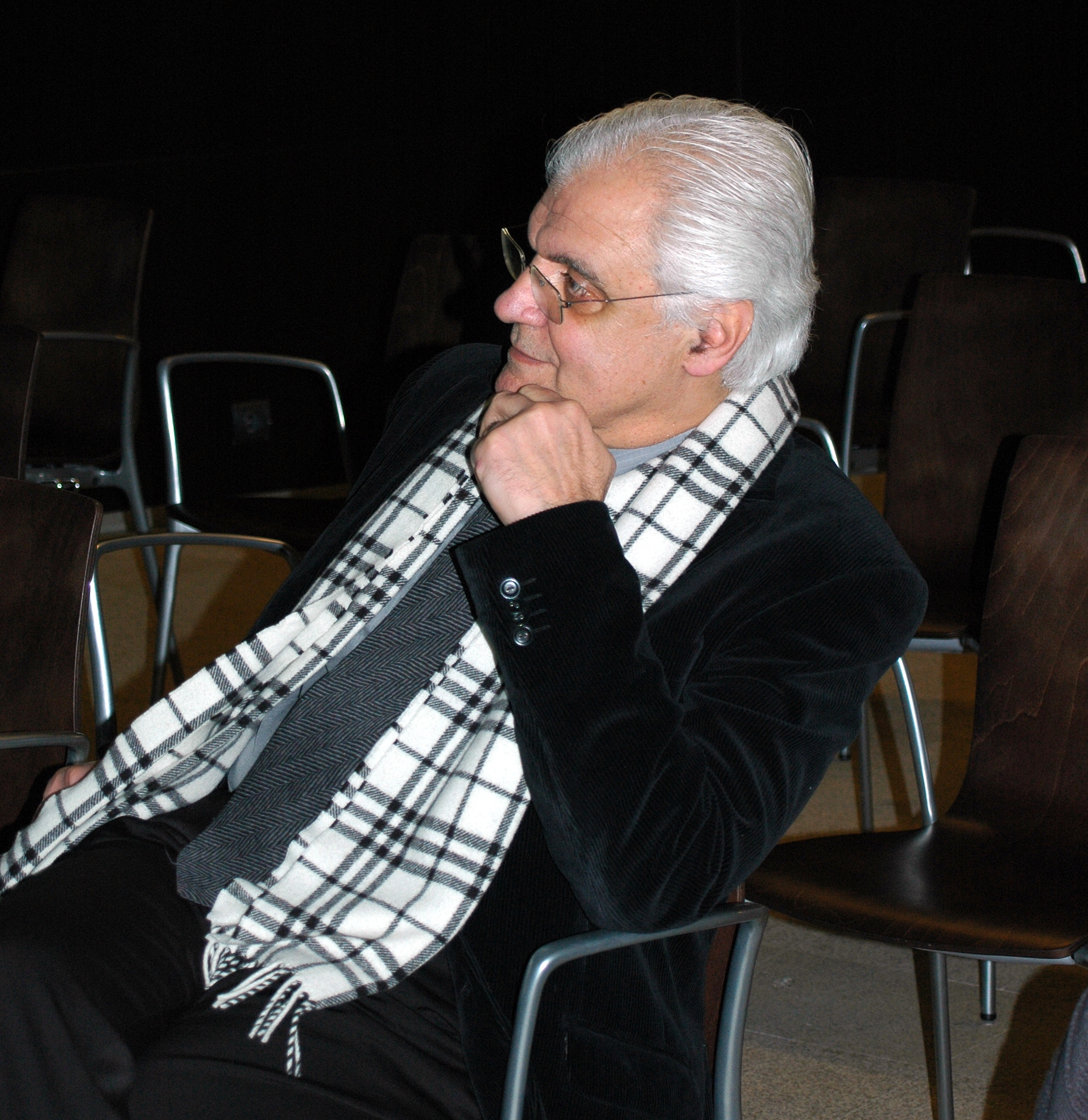 Víctor Freixanes (editorial Galaxia), Vigo